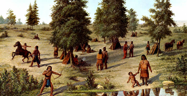 Theodore Gentilz 1840 körül készült festménye a lipanok táboráról